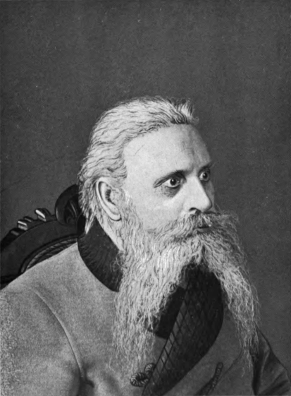 Hornjoserbsce: Pětr Dučman (1839–1907); lěkar a serbski narodny prócowar.